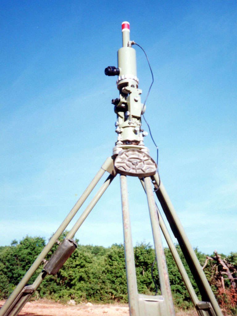 Théodolite Wild T16 et boitier gyroscopique GAK Auteur: PhY - Septembre 1989